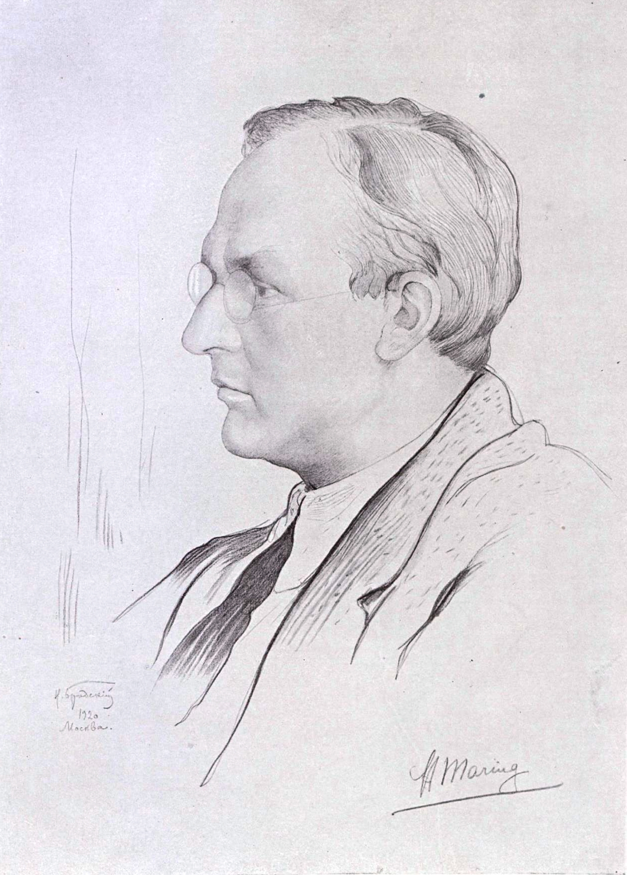 Маринг (Сневлит, Хенк)